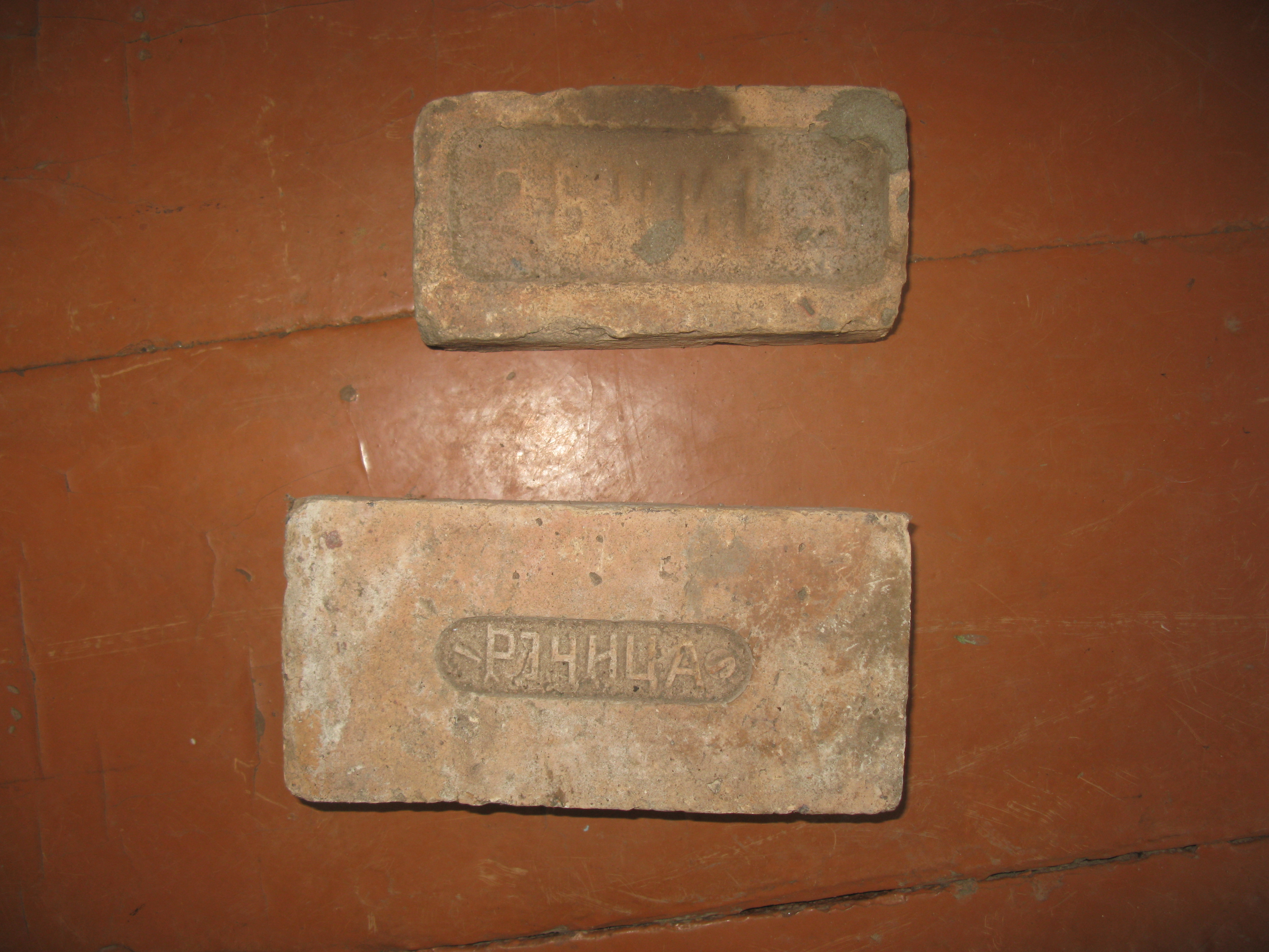 Кирпич Речицкого кирпичного завода.